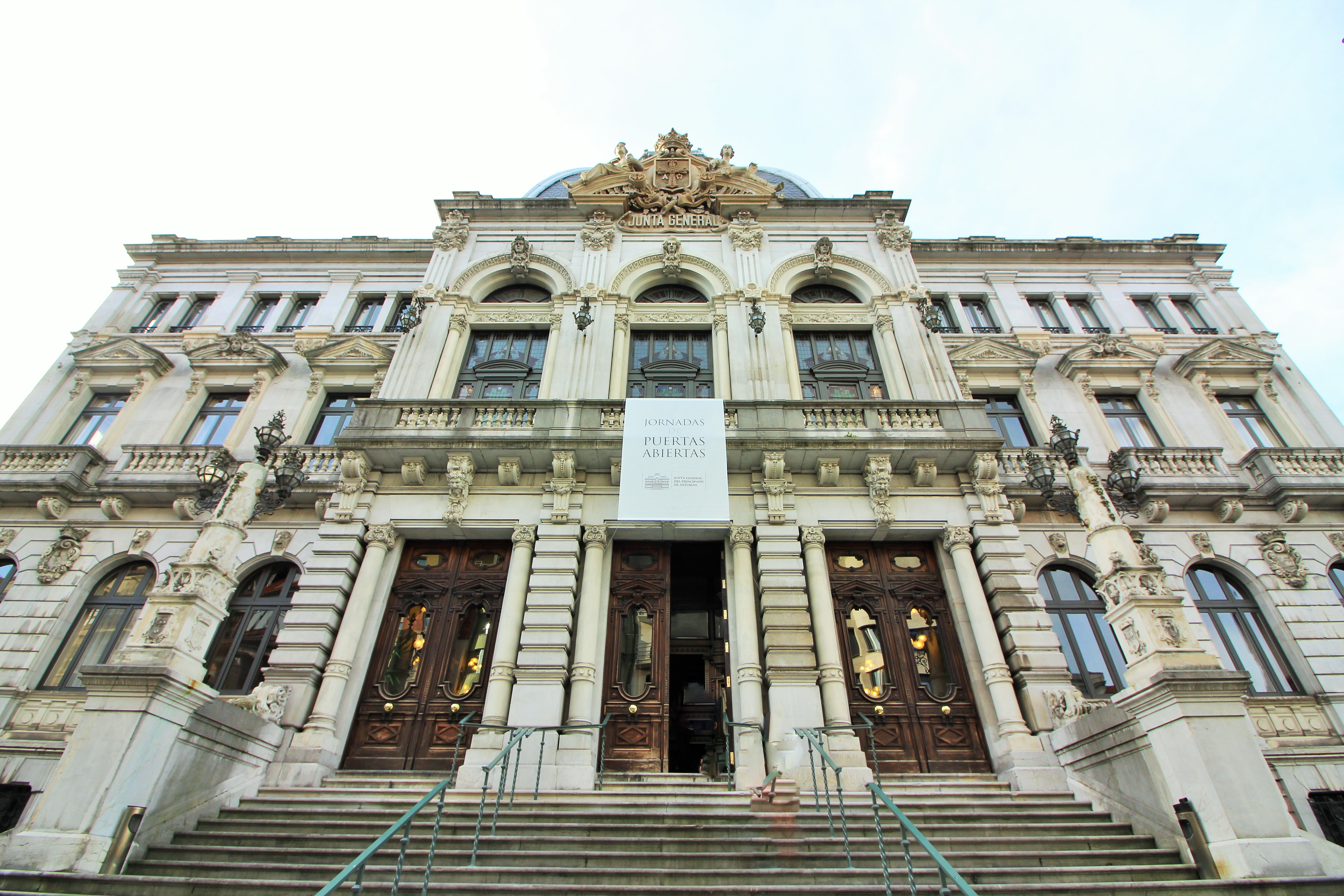 Día de puertas abiertas.